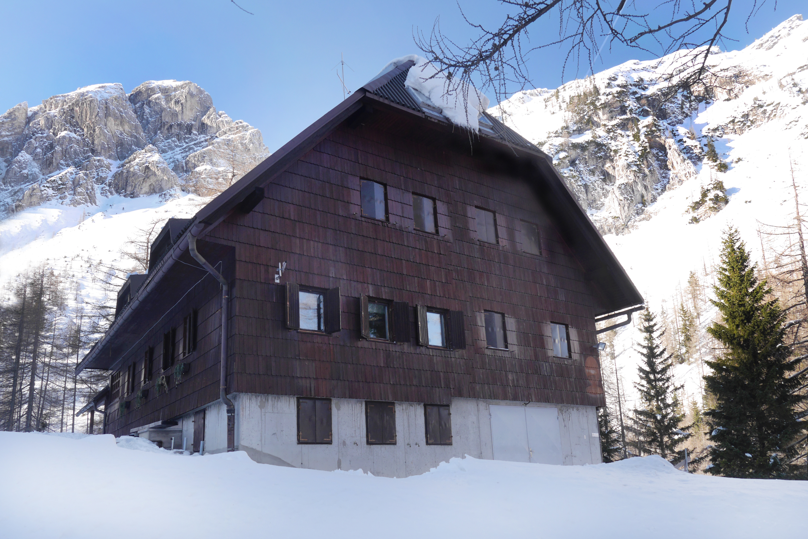 zima